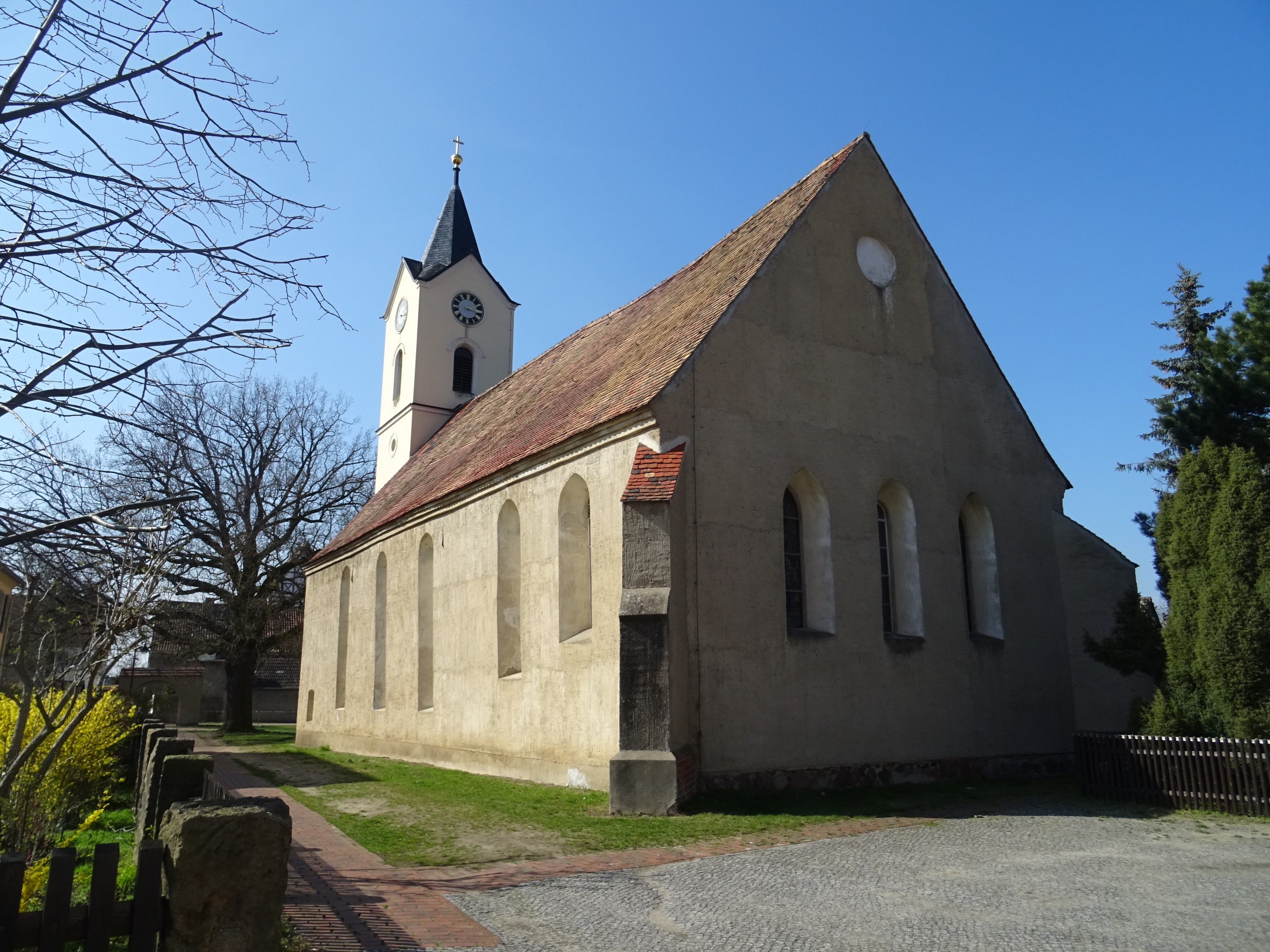 Seyda, denkmalgeschützte Kirche, Blick von Südosten